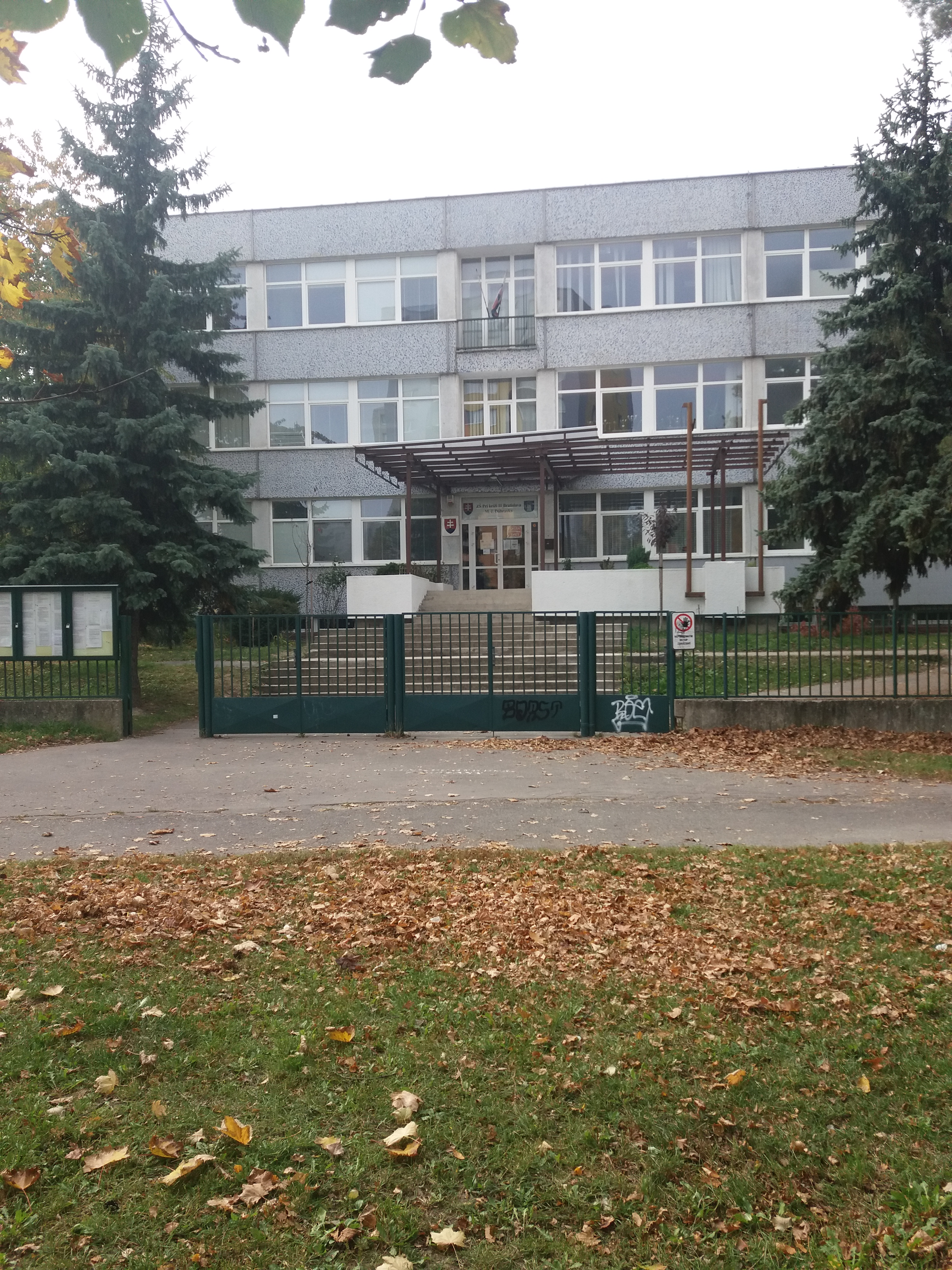 Základná škola